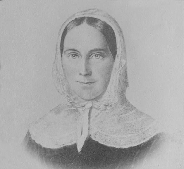 Épouse de Christophe Moehrlen (